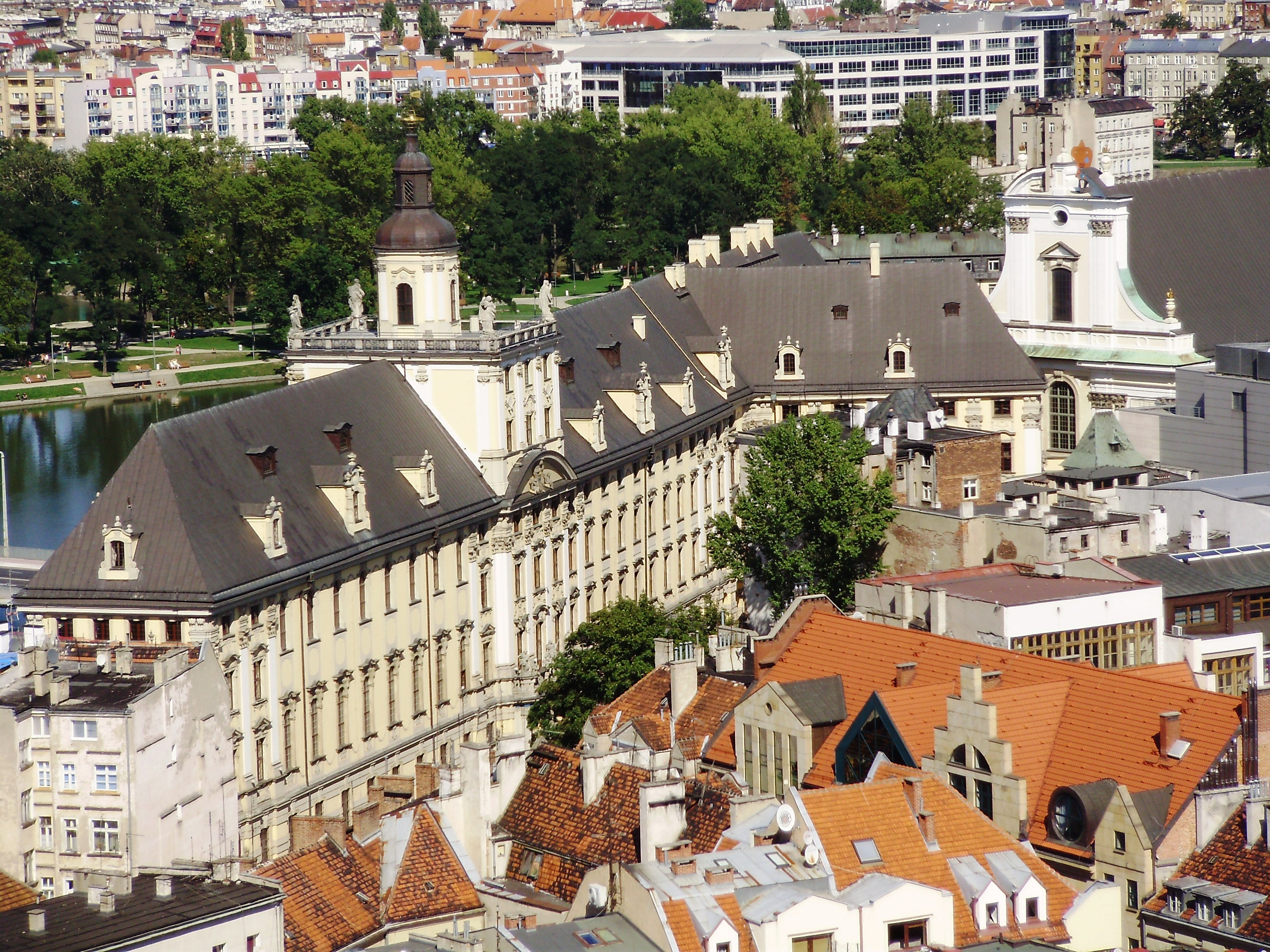 Uniwersytet Wrocławski, d. Kolegium Jezuickie pl. Uniwersytecki 1, Miasto Wrocław - Stare Miasto